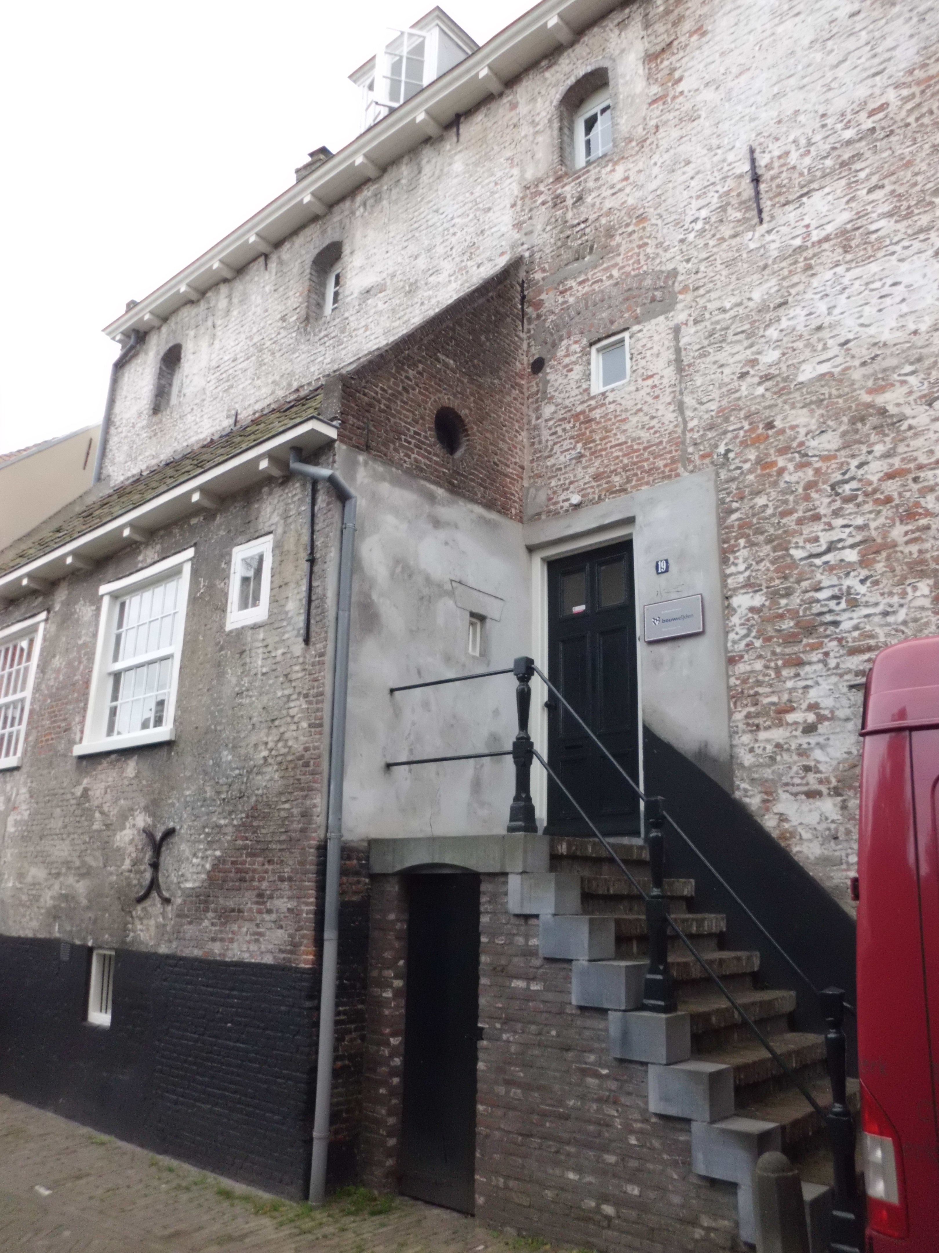 Muurhuizen 19 Amersfoort. Huis Bollenburg.